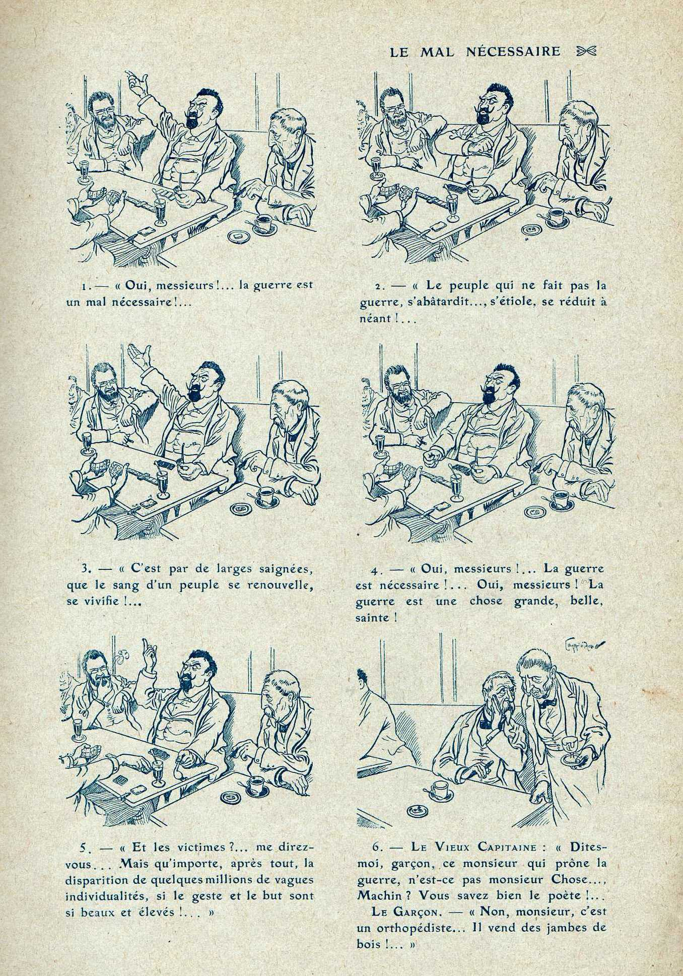 "Le Mal nécessaire" : planche du dessinateur français Caran d'Ache (1858-1909)